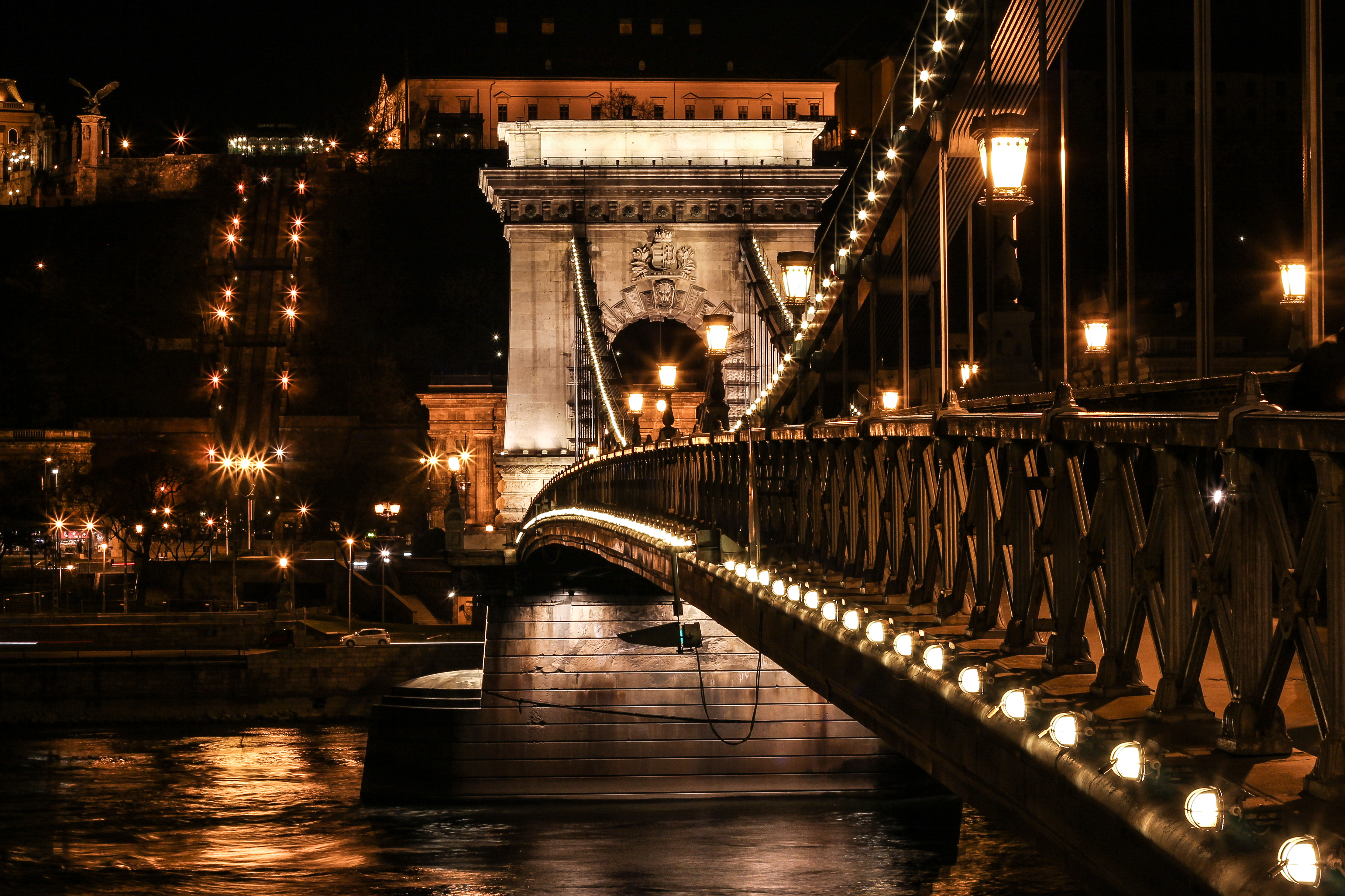 Széchenyi Lánchíd éjjel